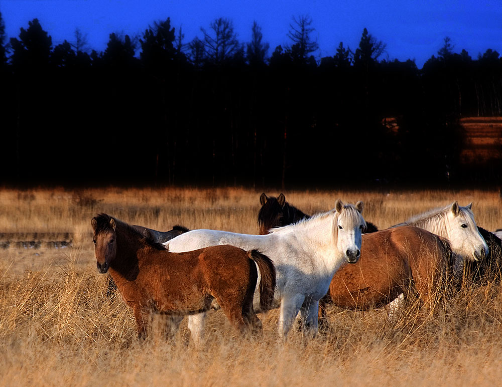 якутские лошади